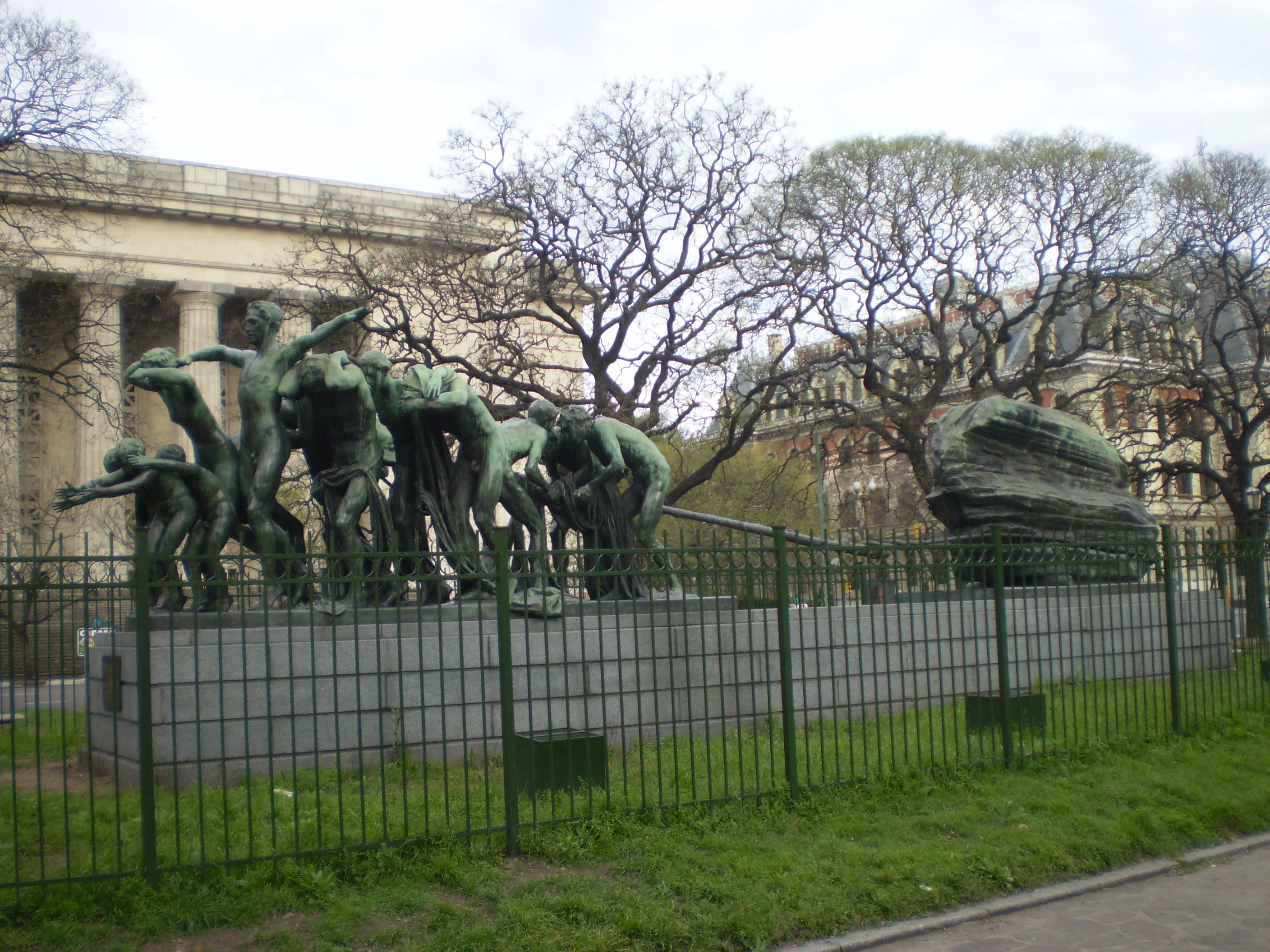 Canto al Trabajo, escultura de Rogelio Yrurtia (1879-1950), ubicado en la avenida paseo Colón al 800. Buenos Aires, Argentina